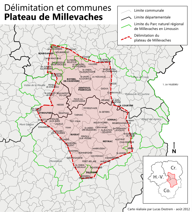 Carte des communes du plateau de Millevaches.